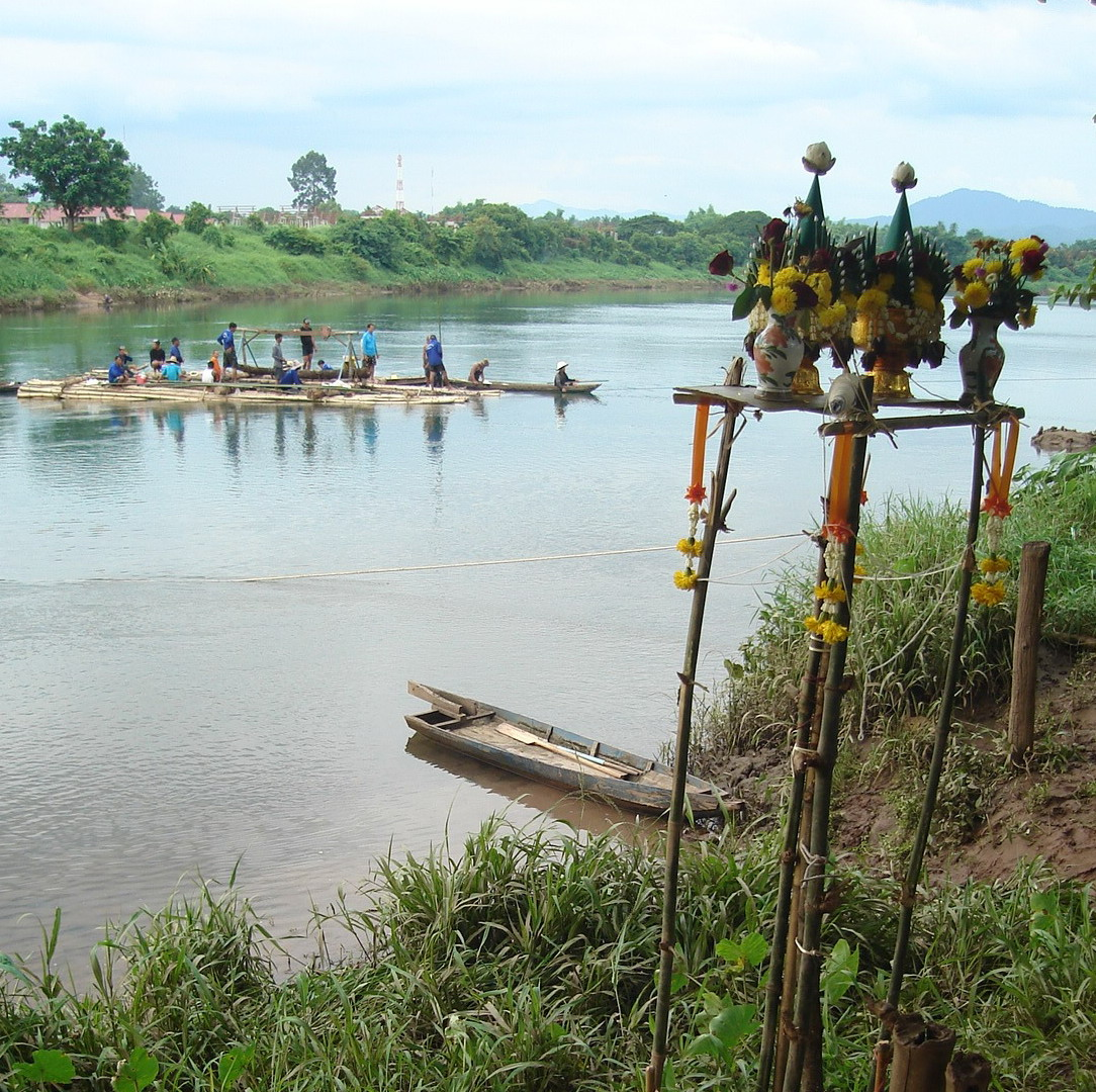 แม่น้ำน่าน ขณะไหลผ่านหมู่บ้านคุ้งตะเภา จังหวัดอุตรดิตถ์ ในภาพเห็นศาลเพียงตาและแพของชาวบ้านในพิธีกรรมบางอย่าง Kungthapao villagers performs a ceremony to worship about a stream Thailand.